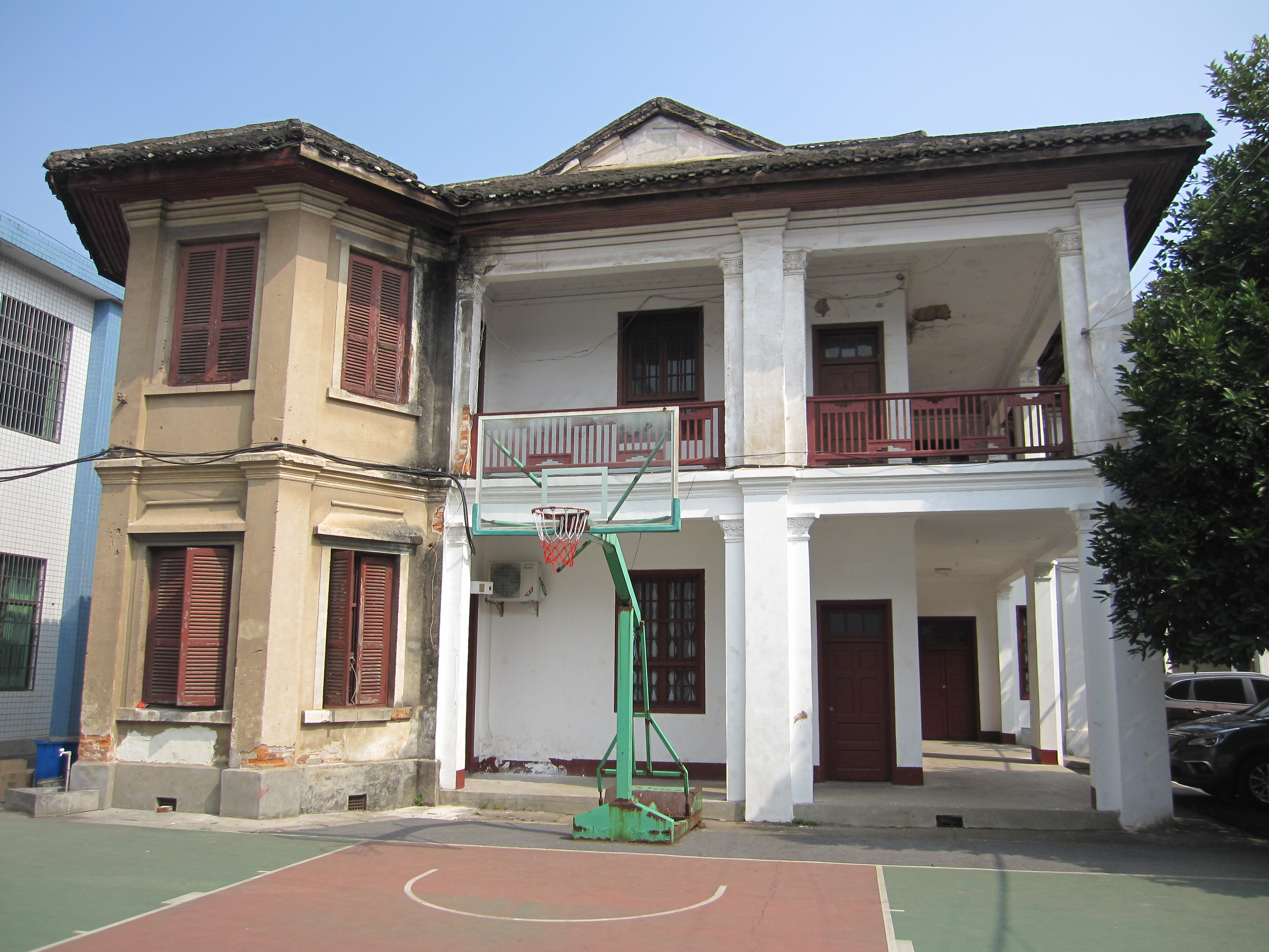 中文（中国大陆）: 胡陶庵荫庐的正面